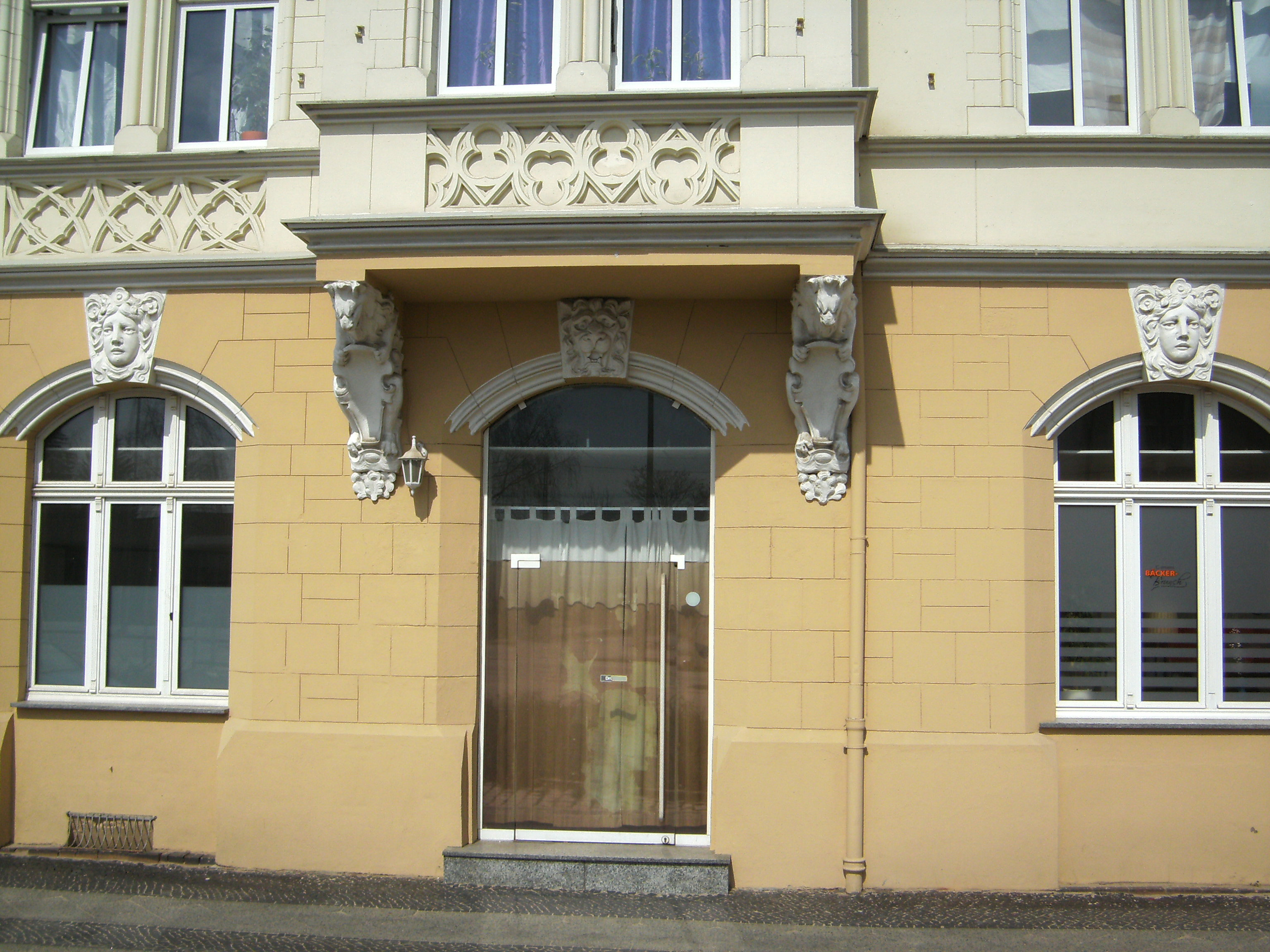 Schillerstraße 33, Bild1